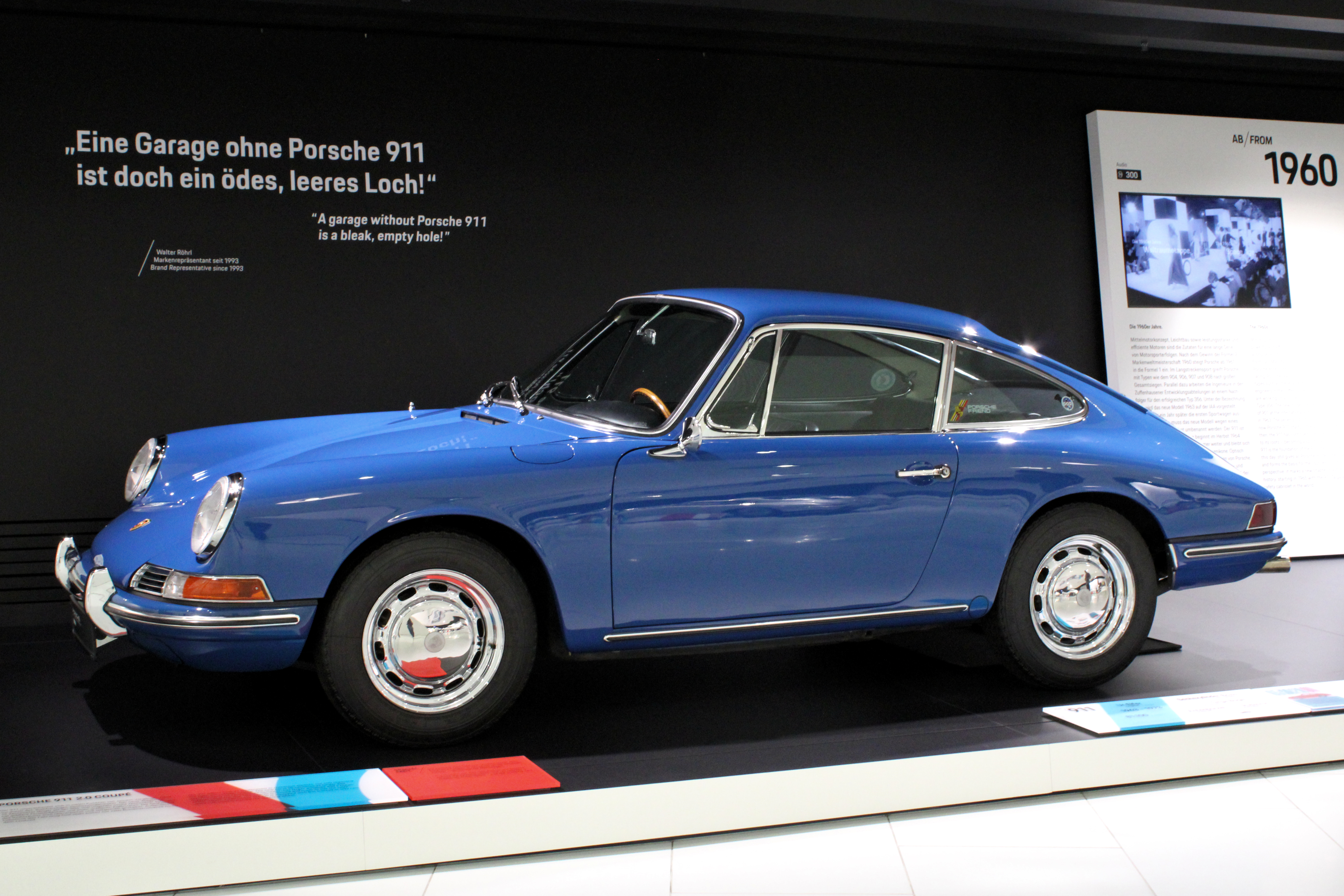 Porsche 911 2.0 Coupe (1964) im Porsche Museum 2018